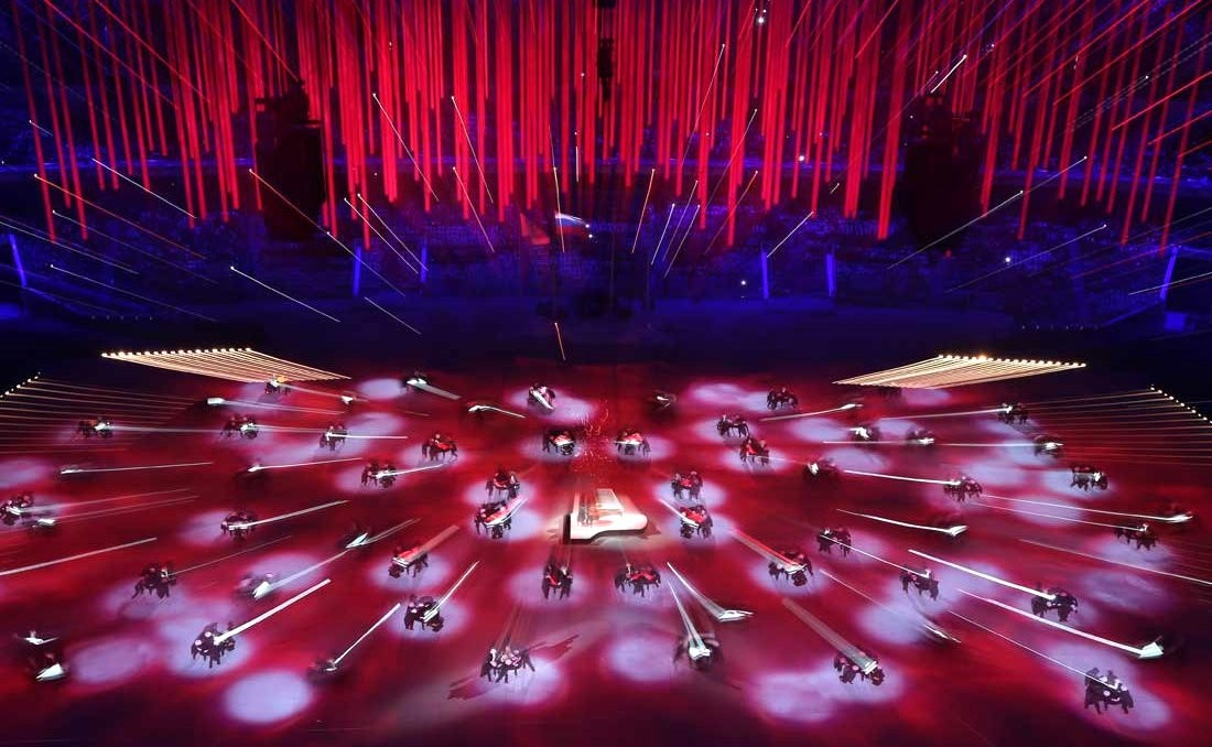 Церемония закрытия зимних Олимпийских игр 2014 - пианист Денис Мацуев